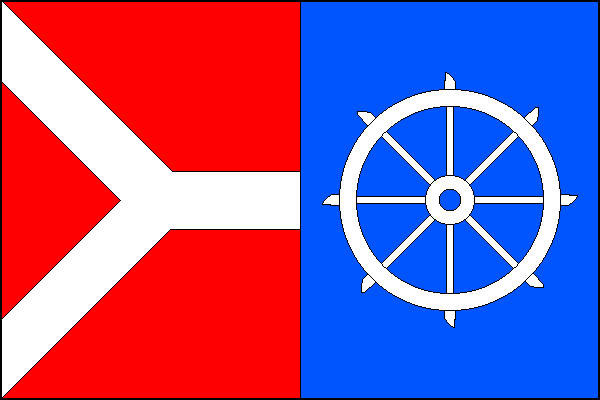 vlajka, Chotěvice, okres Trutnov